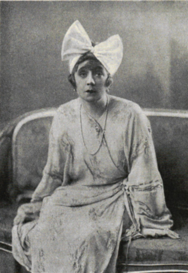 Tollie Zellman som Mrs Dulcie Baxter i pjäsen Mollusken